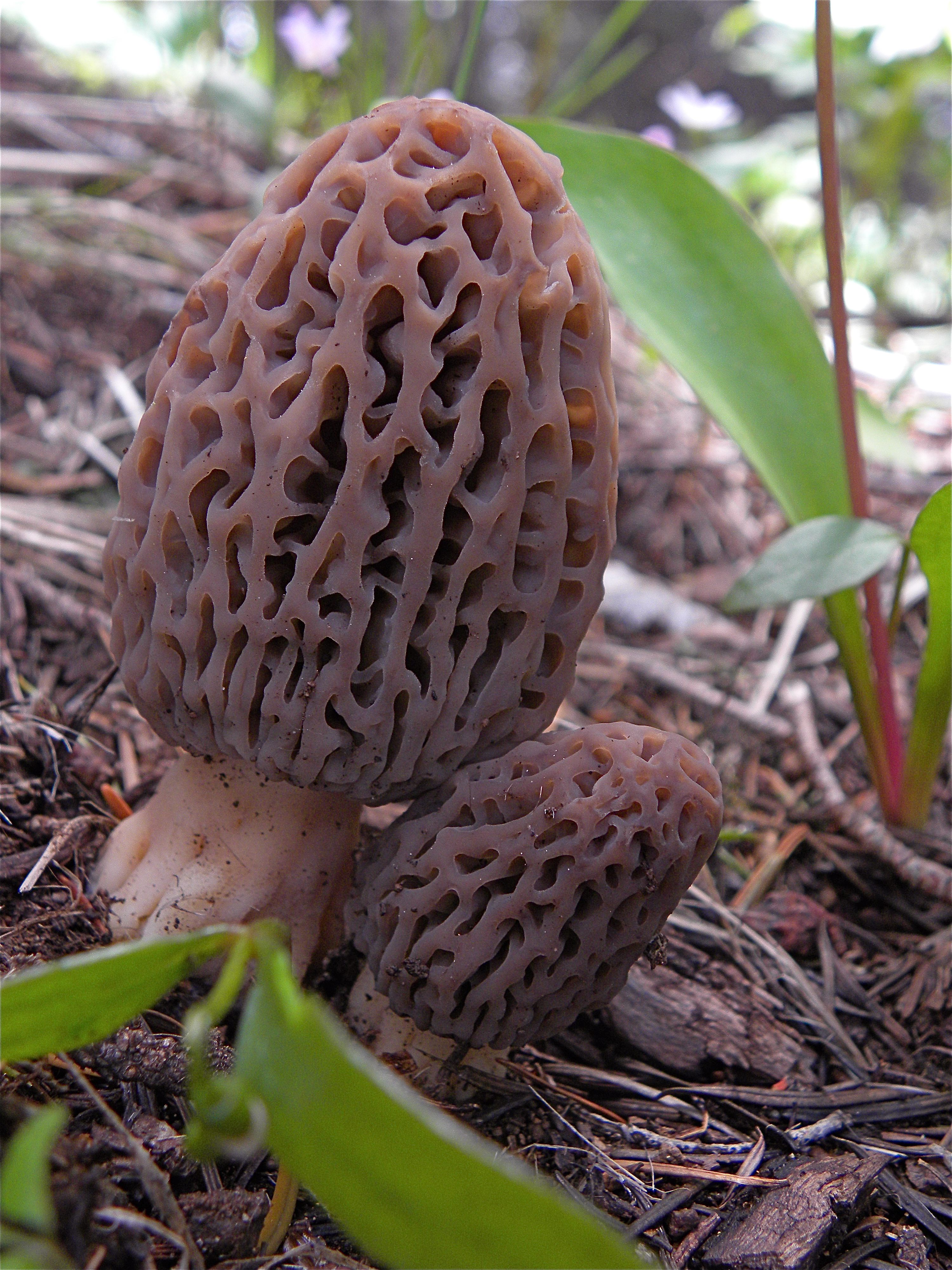 Morchella fungus